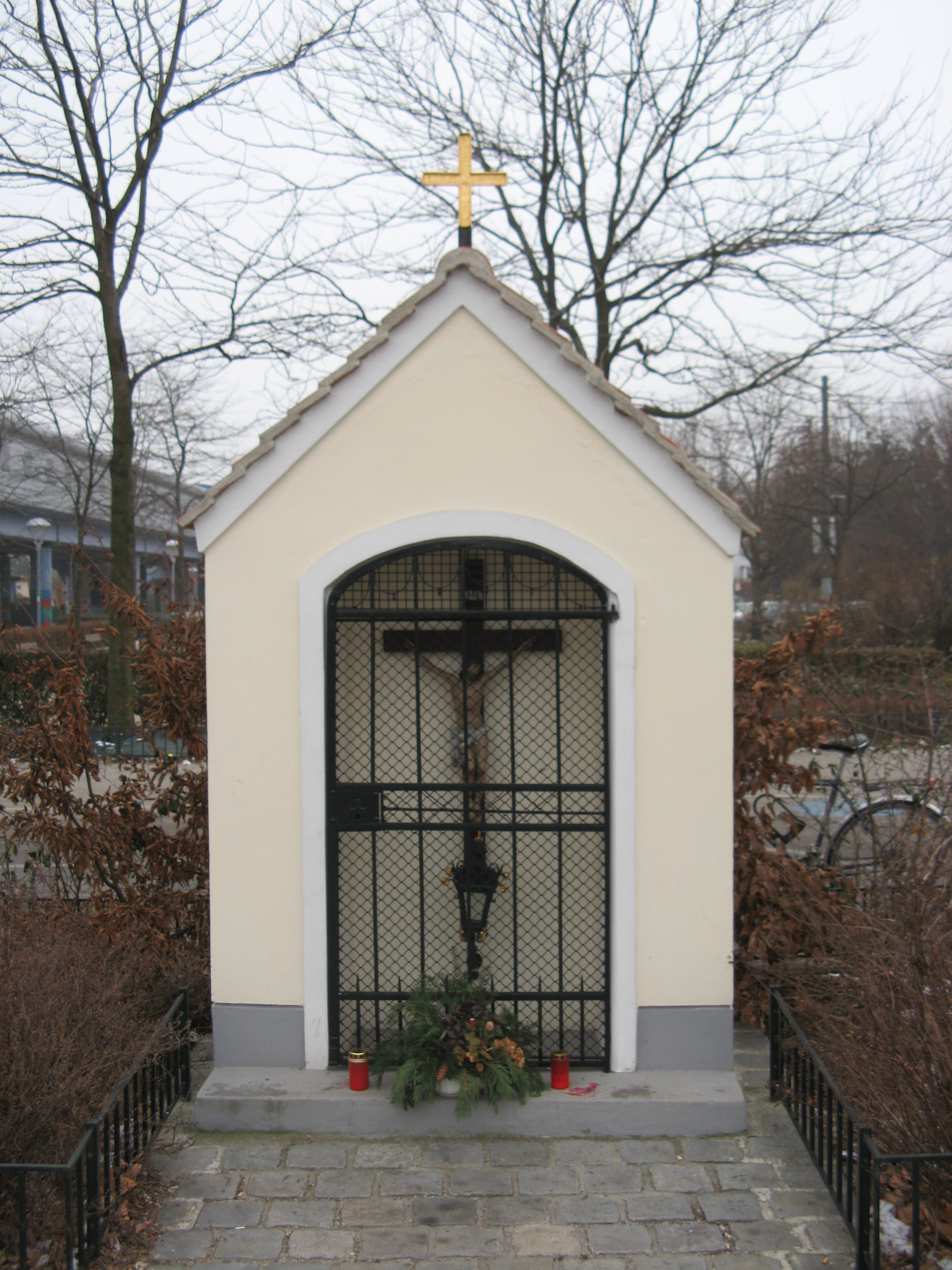 Anna-Kapelle bei der Wohnhausanlage Am Schöpfwerk in Wien-Meidling